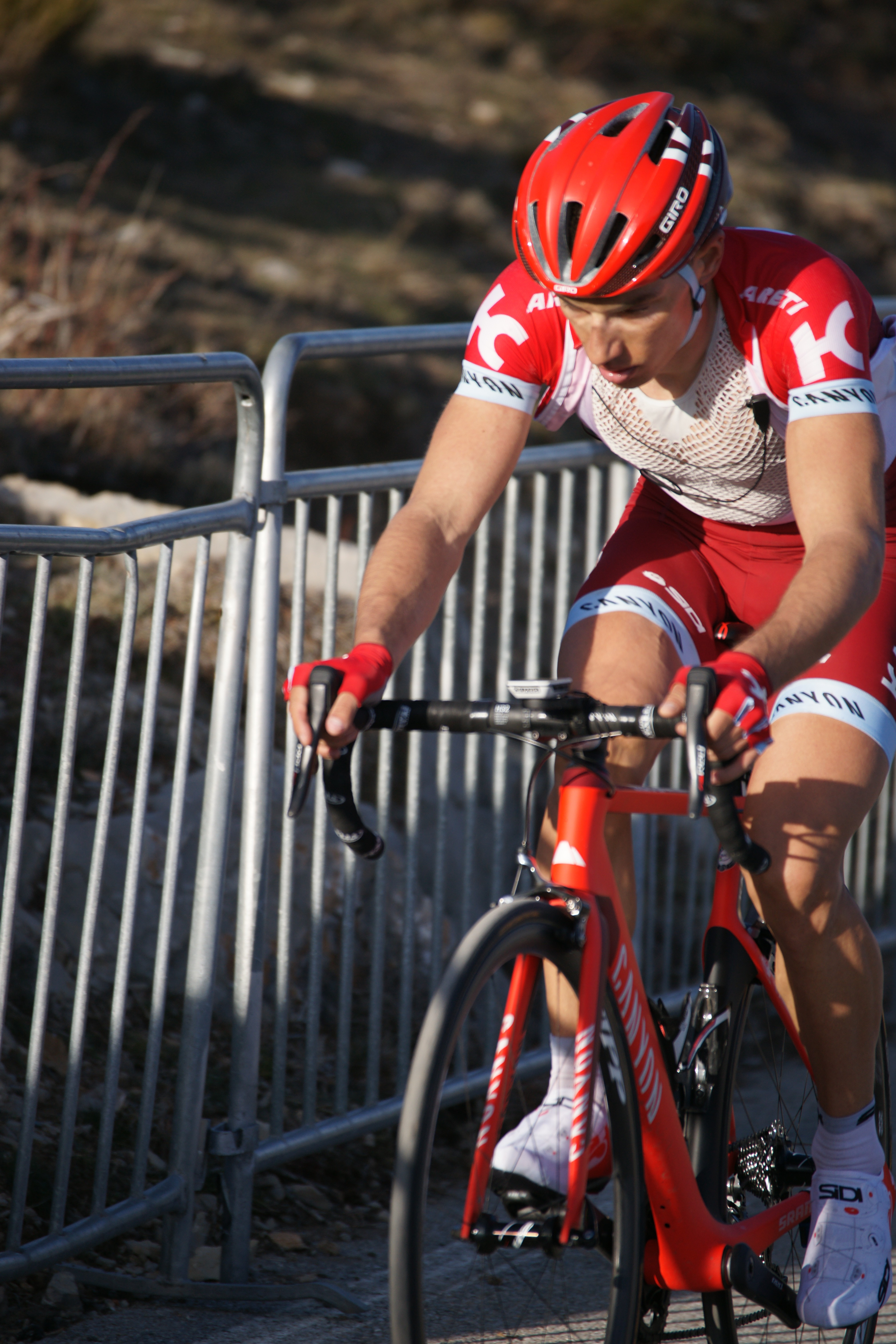 Simon Spilak Madone d'Utelle 2016 Depicted person: Simon Špilak Depicted team: Katusha